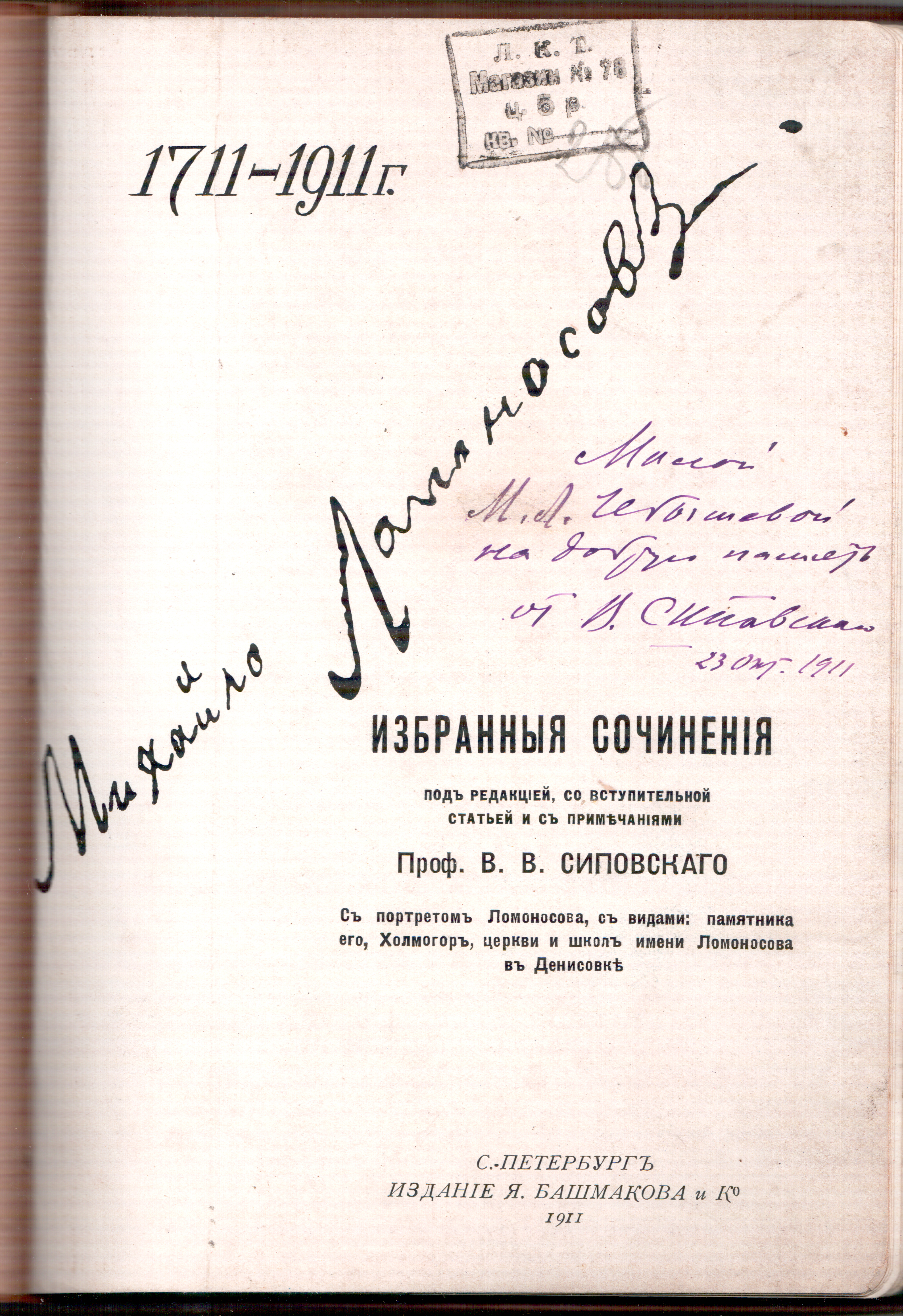 Титульный лист книги М. Ломоносова с автографом редактора В. В. Сиповского.